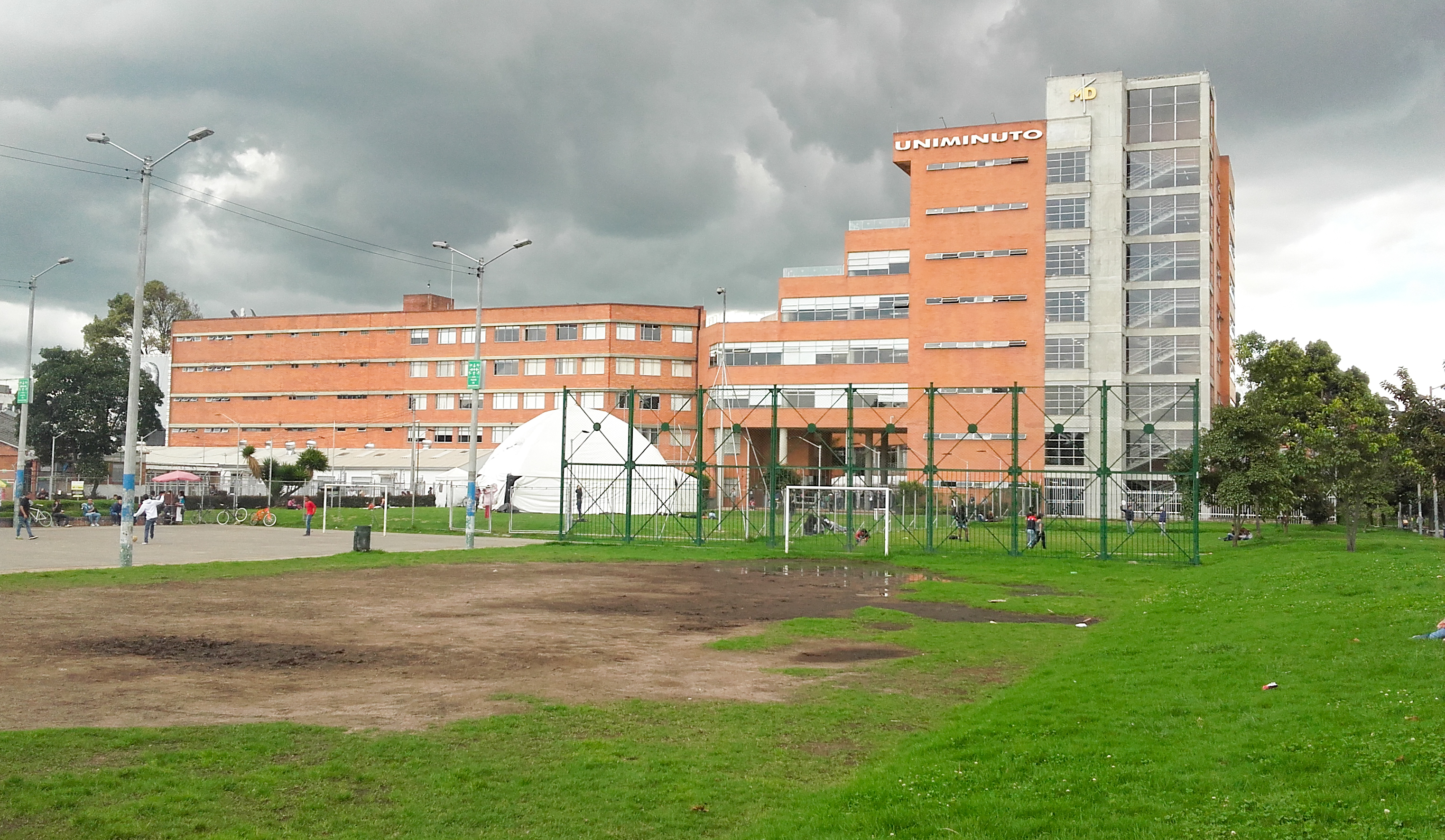 cfmmfmfmfkgkgkckkckvkvkvkg